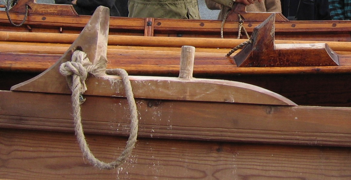 Keip med tolrpinne, keip frå Hardanger